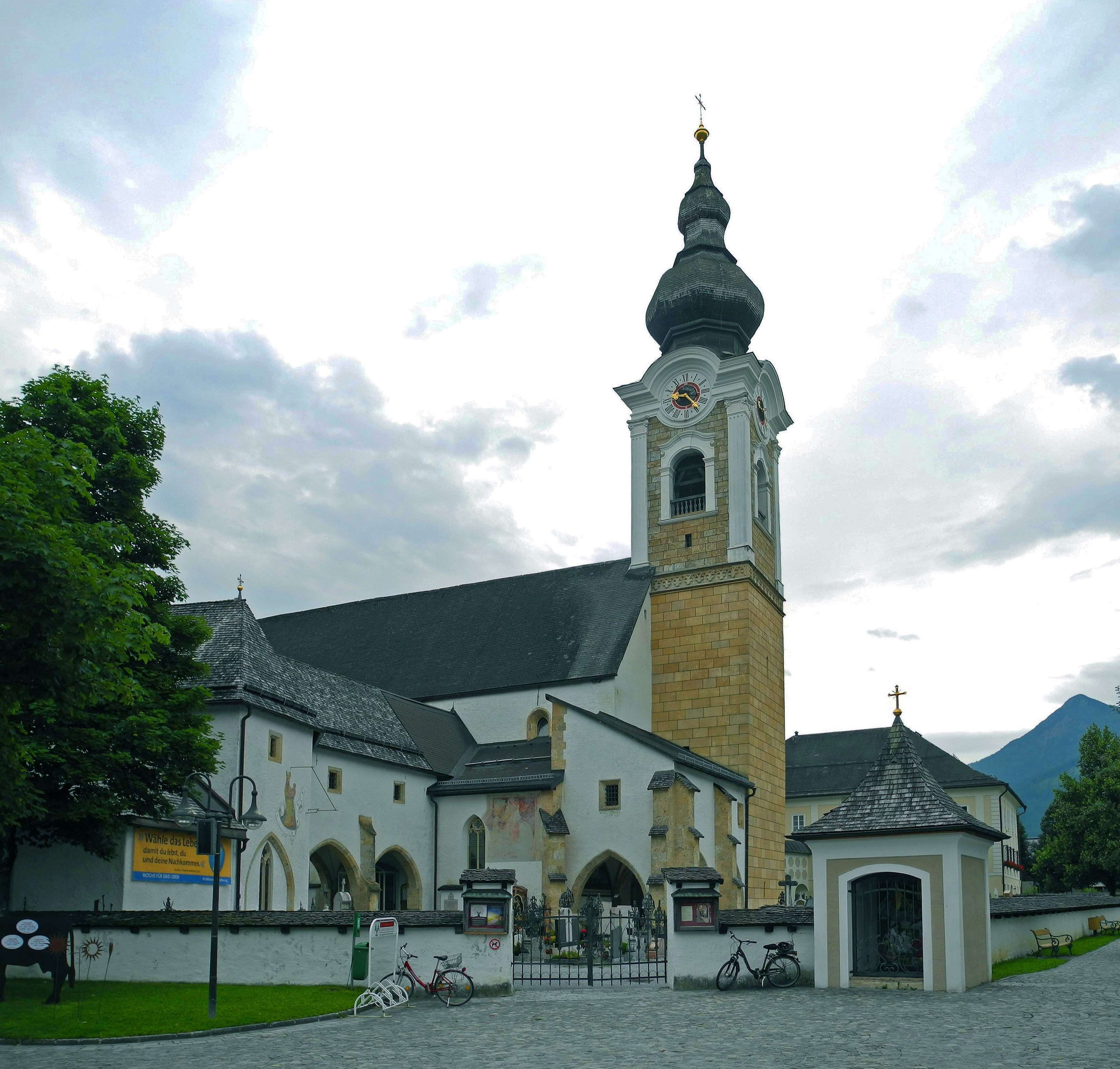 Dekanatskirche Mariä Geburt in Altenmarkt im Pongau